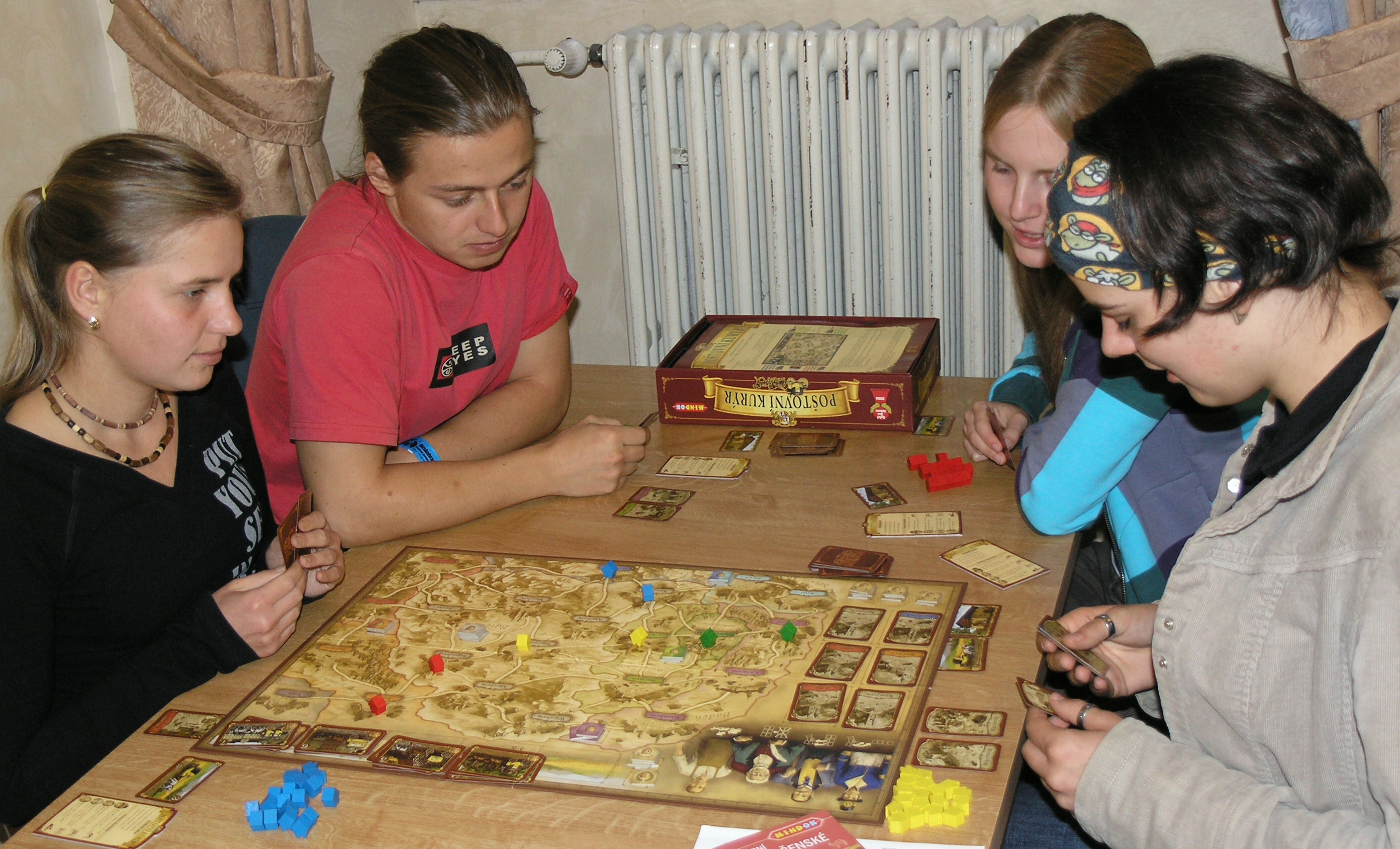 Deskohraní 2008